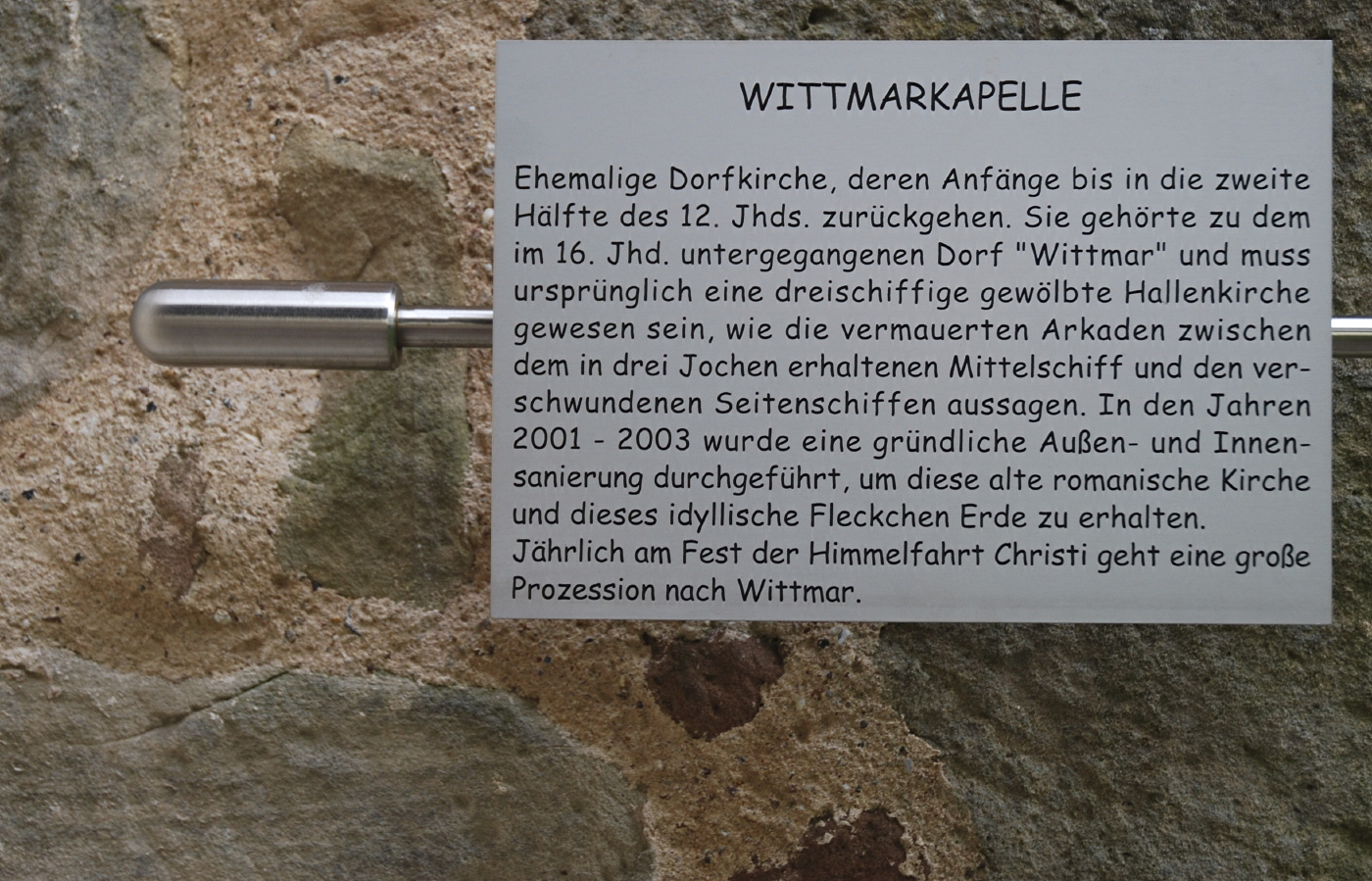 Dauerhaft angebrachte Infotafel an der Wittmarkapelle im Twistetal an der Landstraße zwischen Volkmarsen und Welda, Volkmarsen, Hessen, Deutschland.